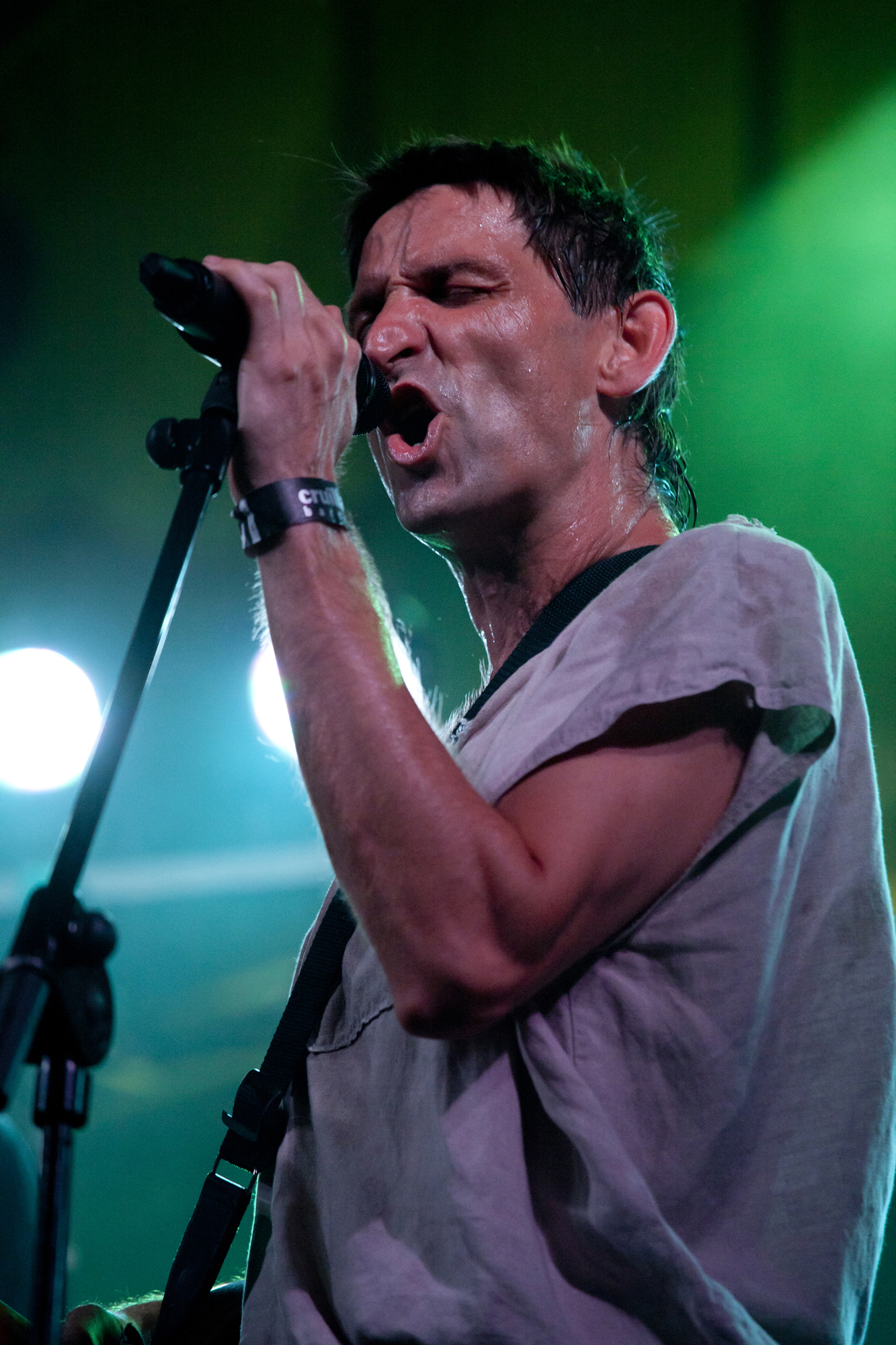 Albert Pla y Los Sujetadores - Cruïlla 2010